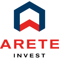 ARETE INVEST investiční fond s variabilním základním kapitálem, a.s